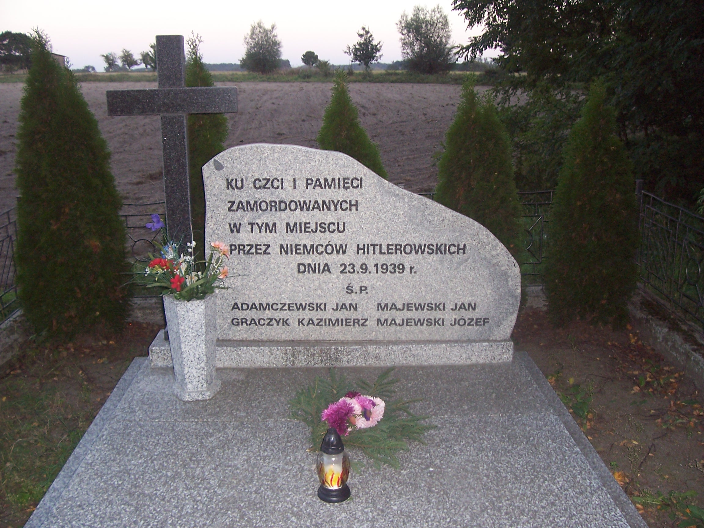 Pomnik na Miejscu Pamięci w Boguniewie removed from pl.wiki [1] Author - Blazej104